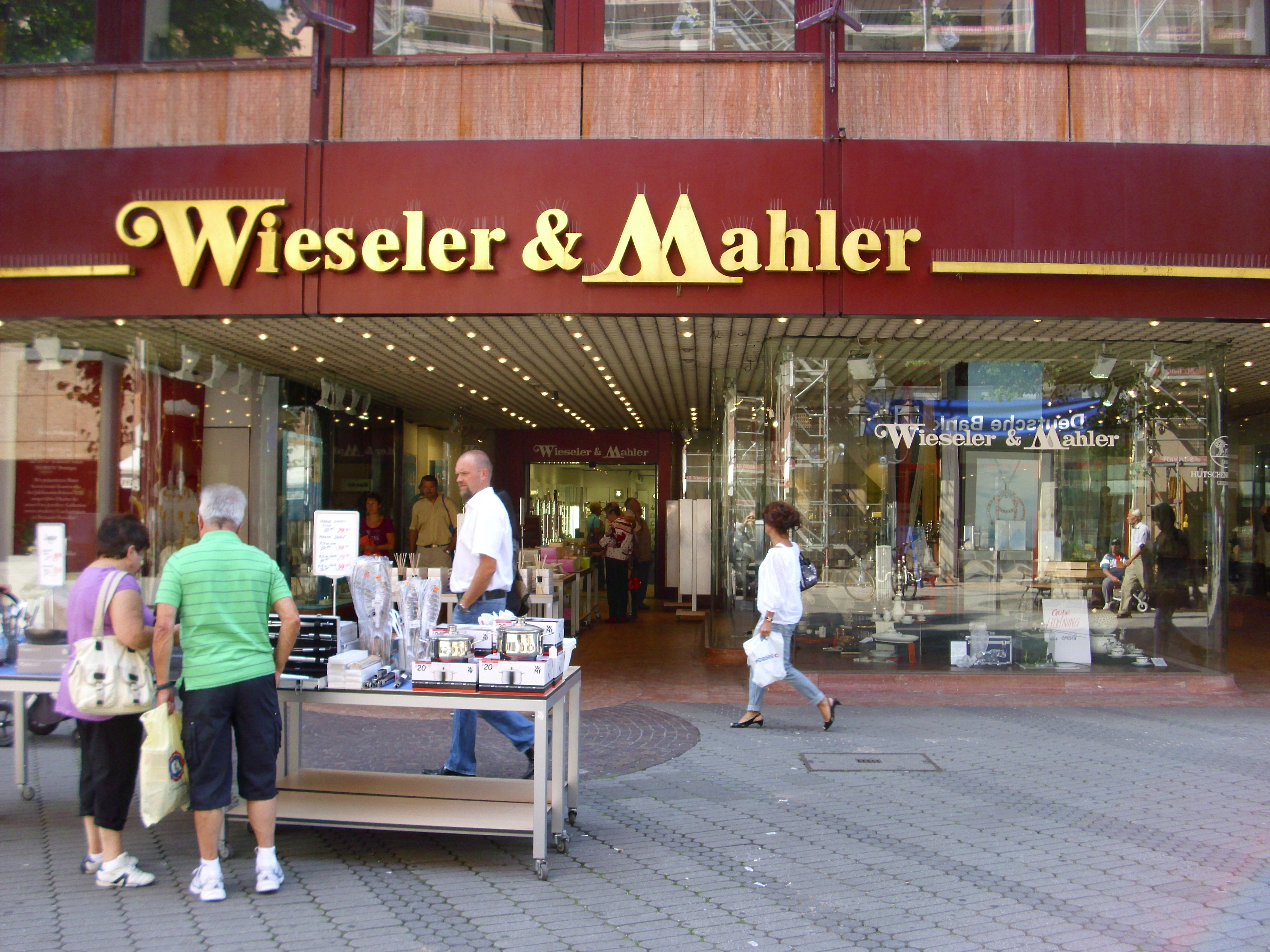 Die Wieseler & Mahler WMF Filiale in der Karolinenstraße 27-29 in Nürnberg bietet Waren aus dem Bereich Porzellan, Glas, Besteck, Hausrat und Tischwäsche an.